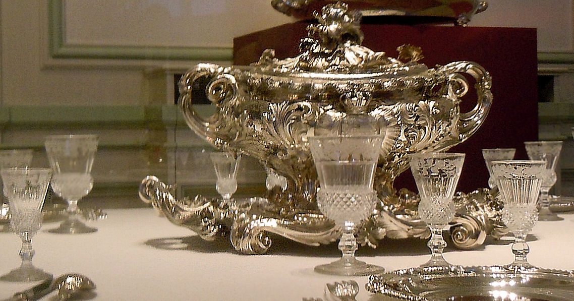 CR Brussel